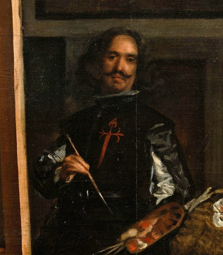 Diego Velázquez, auto-retrato pintado dentro del cuadro Las Meninas (1656).